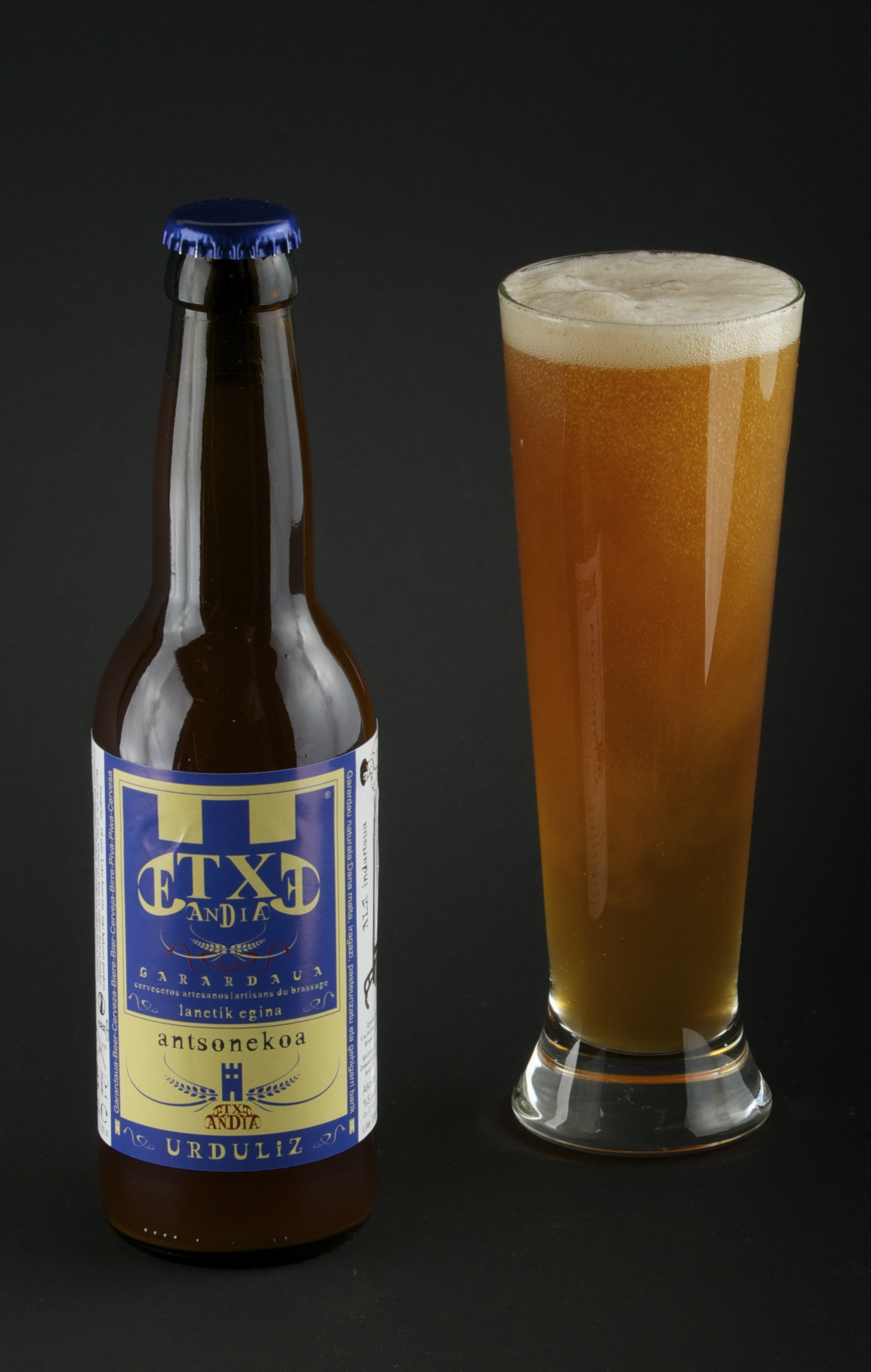 Etxeandia Garardau fabrikaren produktuetariko bat: Antsonekoa garagardoa